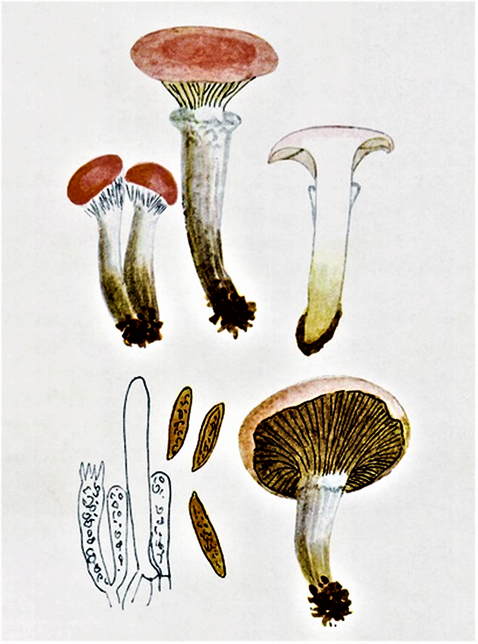 Giacomo Bresadola: Gomphidius roseus Fr. (1821 und 1838)